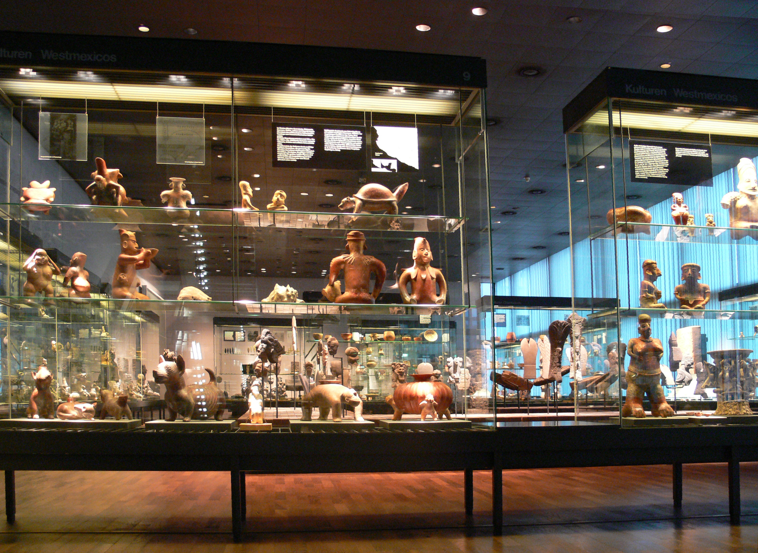 Ethnologisches Museum, Berlin-Dahlem